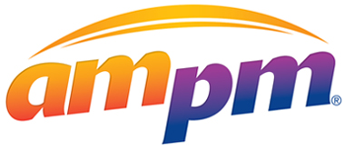 logo ampm